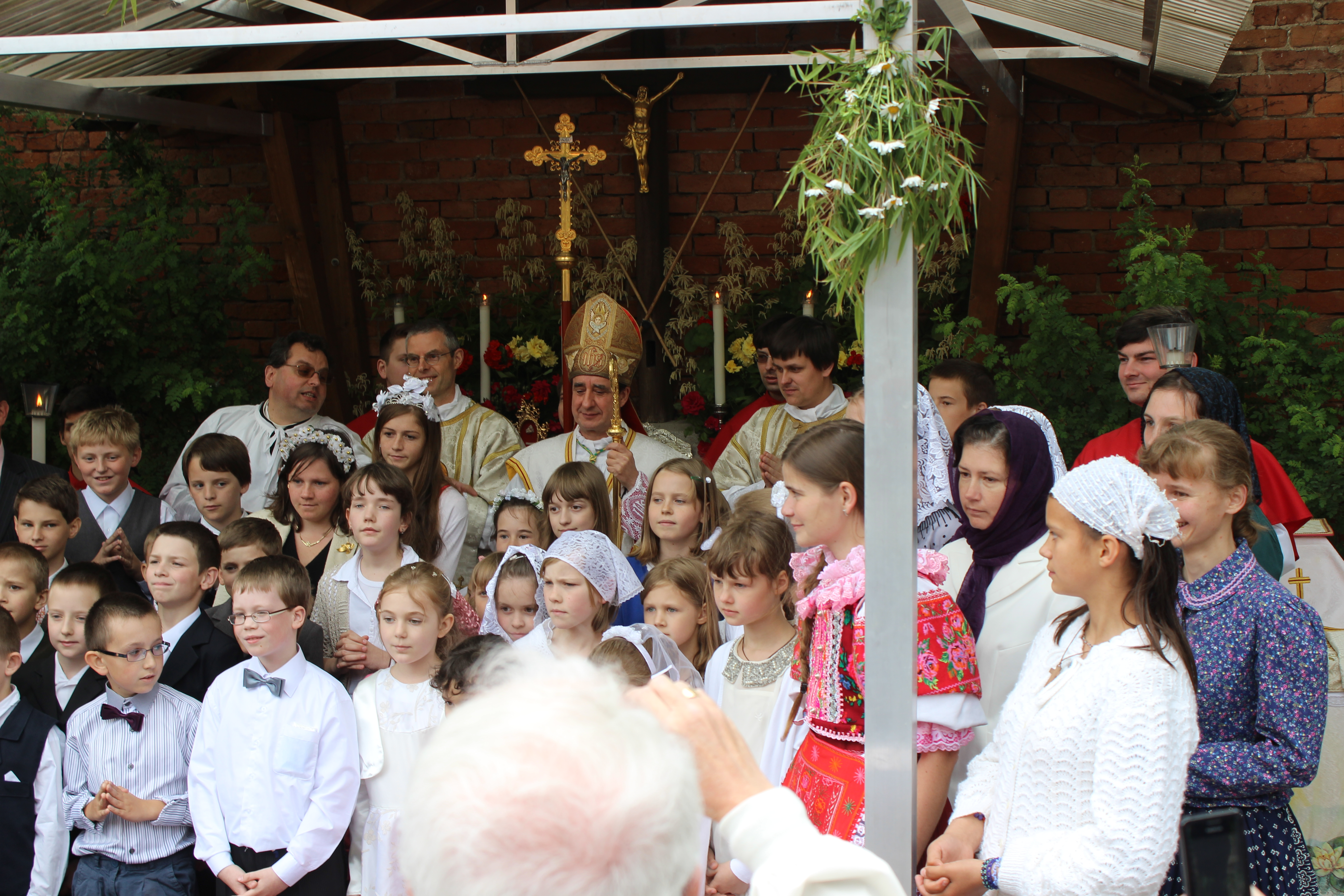 Biřmování a tridentská mše svatá Kněžského bratrstva svatého Pia X. v kapli Královny posvátného růžence v Brně-Černovicích 31.05.2014 od 10:00; hlavní celebrant biskup Alfonso de Galarreta